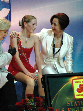 Sarah Brannen, Skating Magazine, Oct. 2005